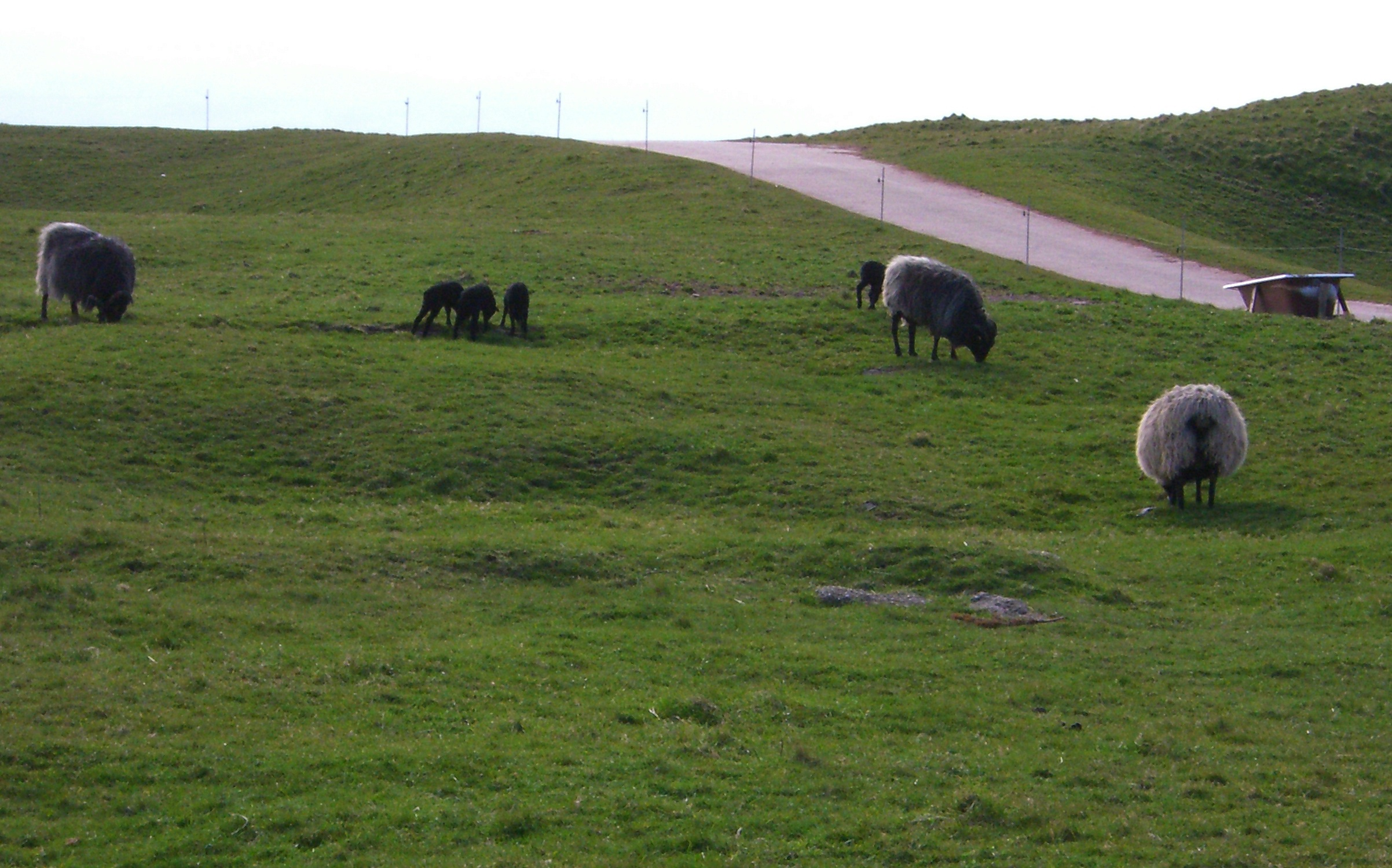 Helgoland, Schafe grasen auf dem Oberland